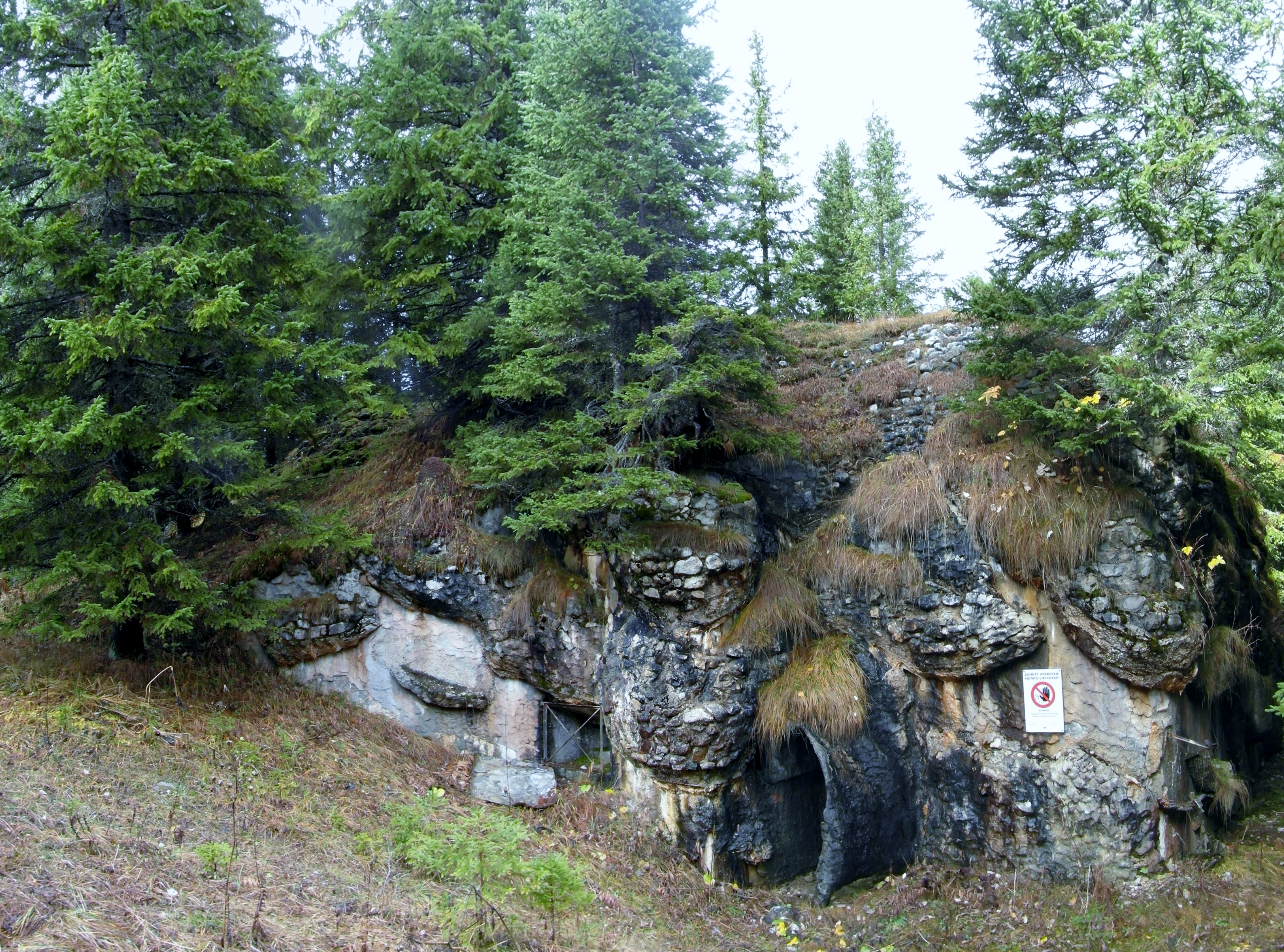 Opera 2 Comelico